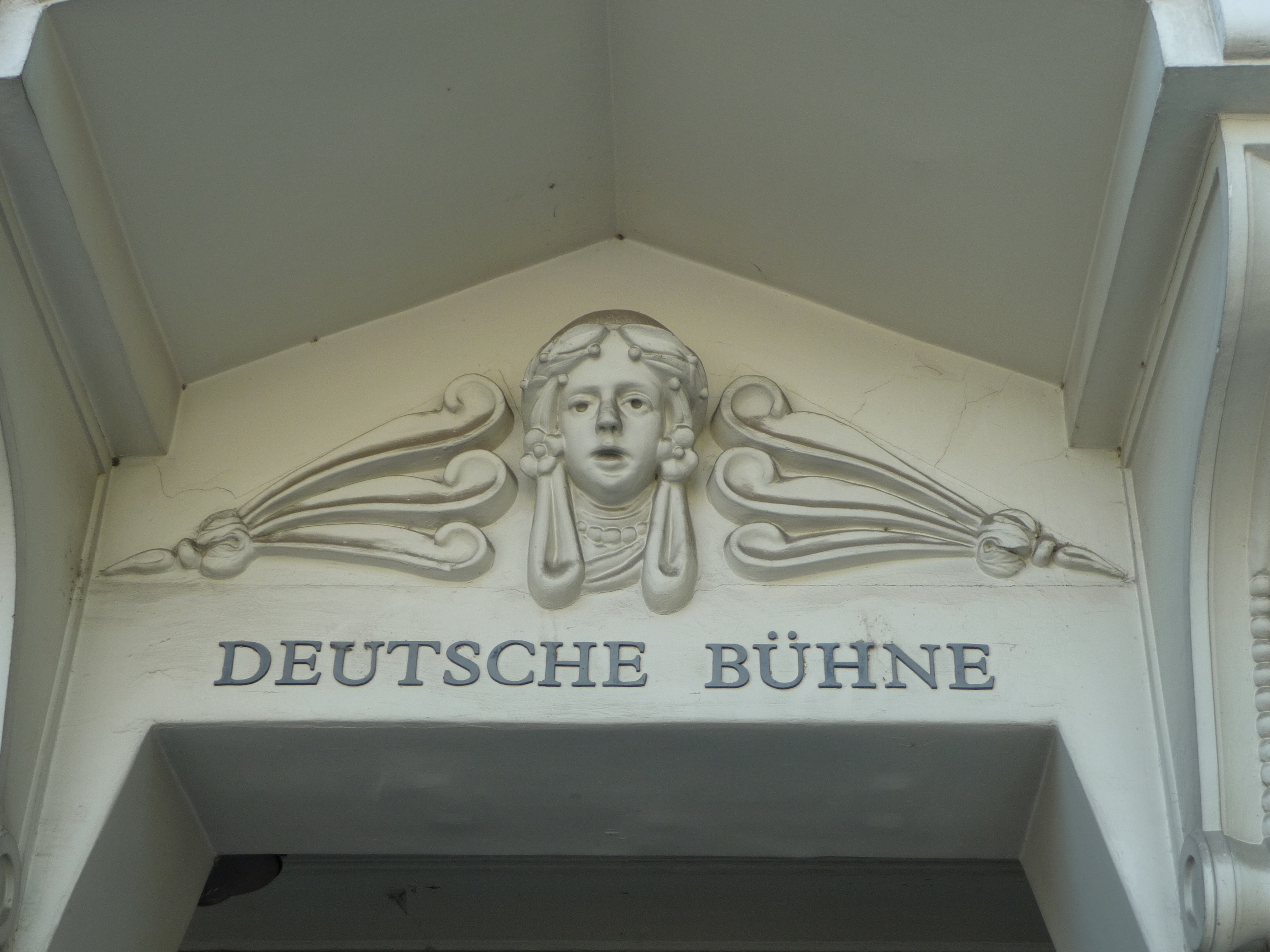 Angyalka a Deutsche Bühne Ungarn bejárata fölött, Szekszárd